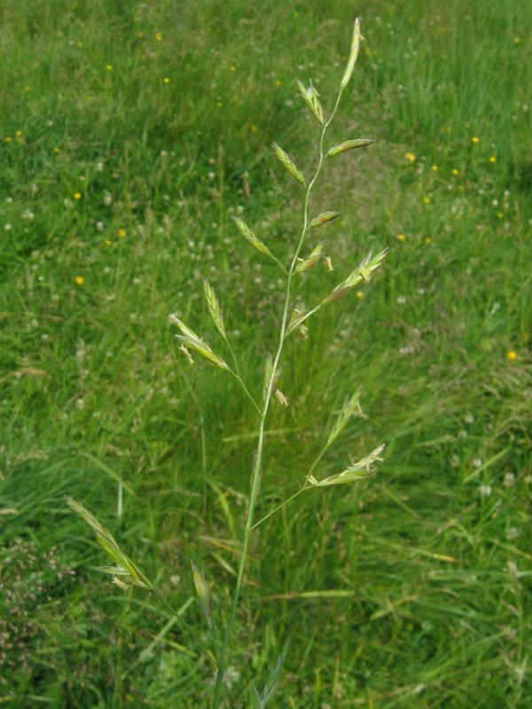 Wiesen-Schwingel (Festuca pratensis), Gragetopshof